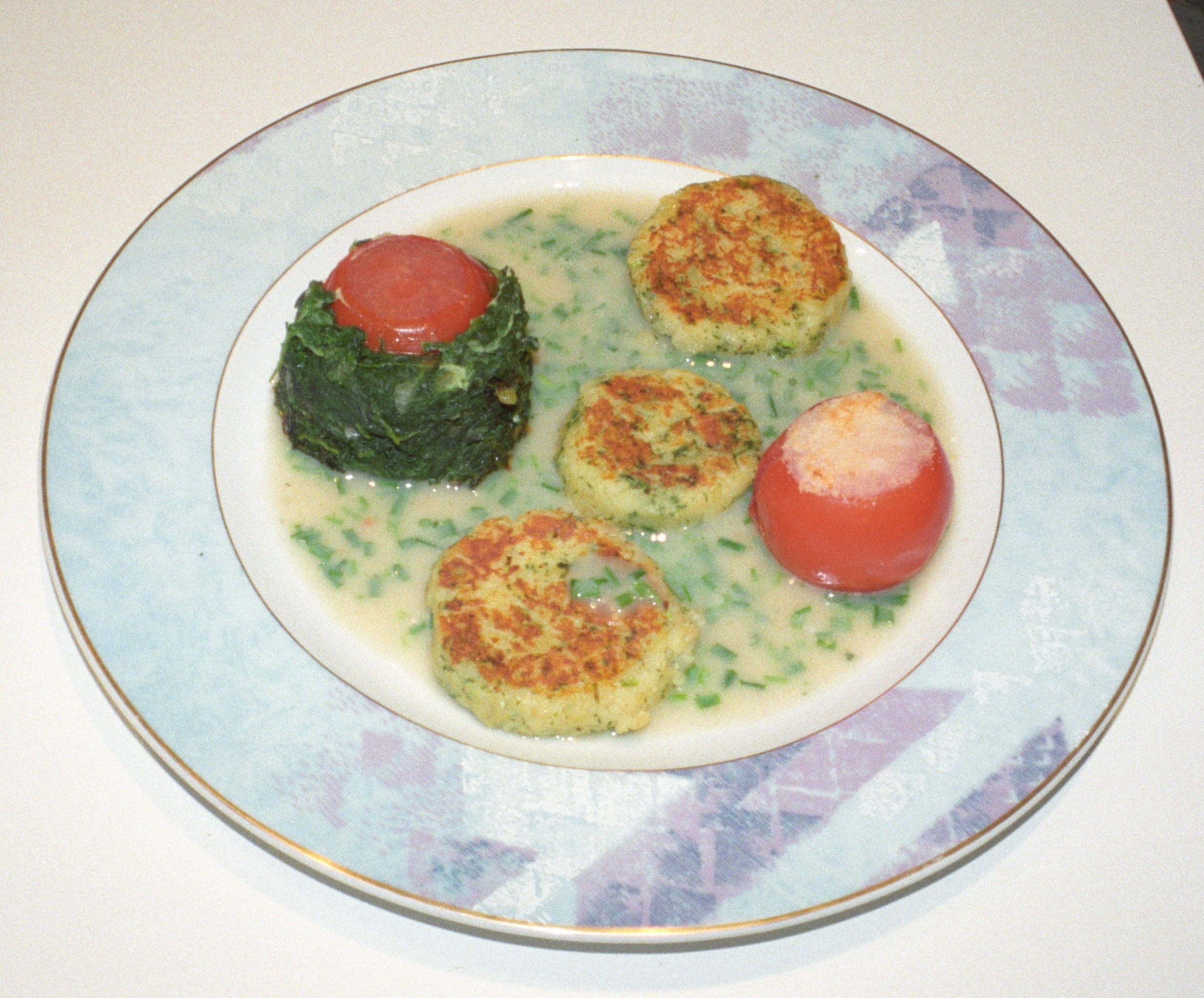 Diätteller Mittagessen in der Fastenklinik Schloss Warnsdorf 1985